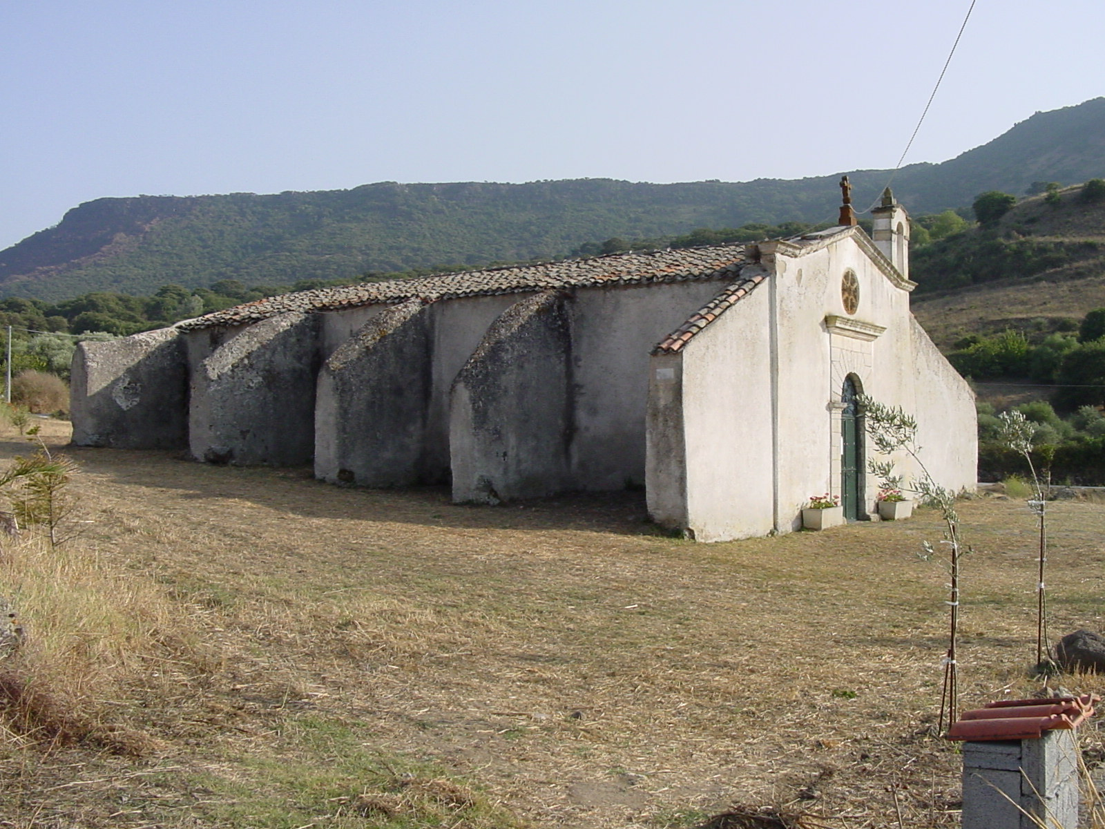 Siligo. Chiesa di San Vincenzo Ferrer. Esterno